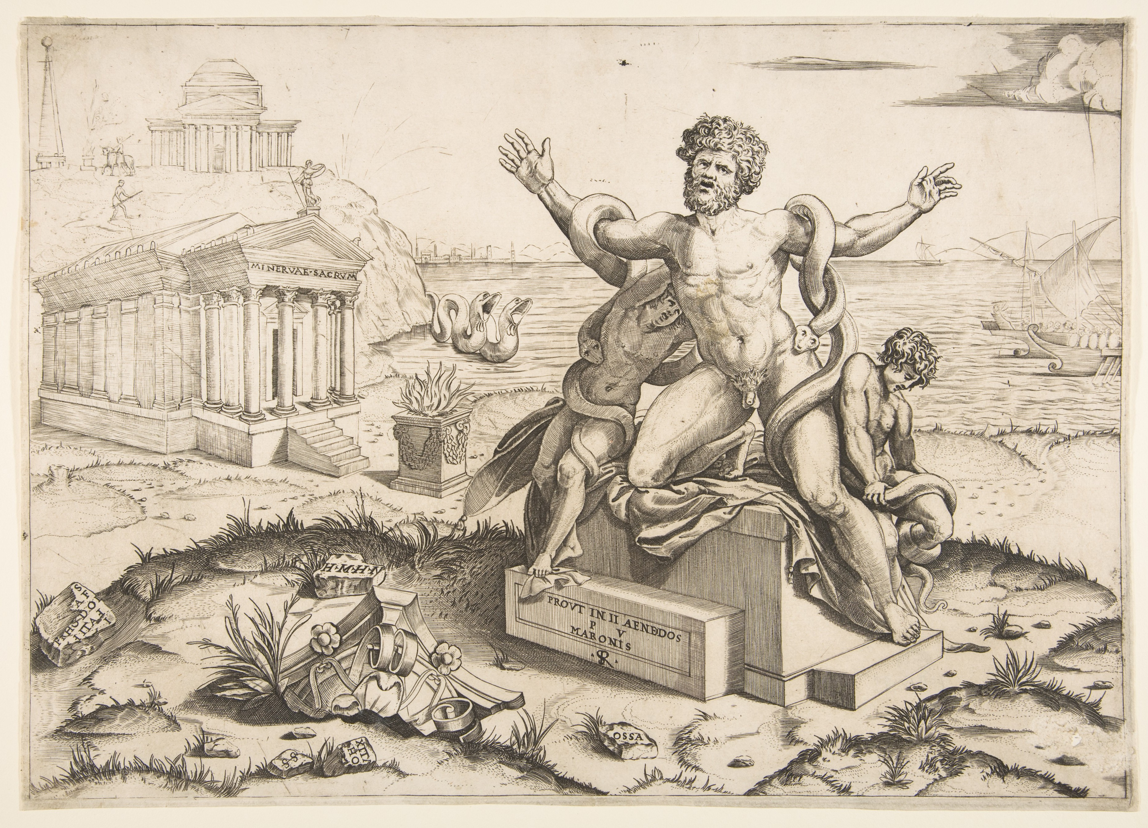 Incisione di Marco Dente